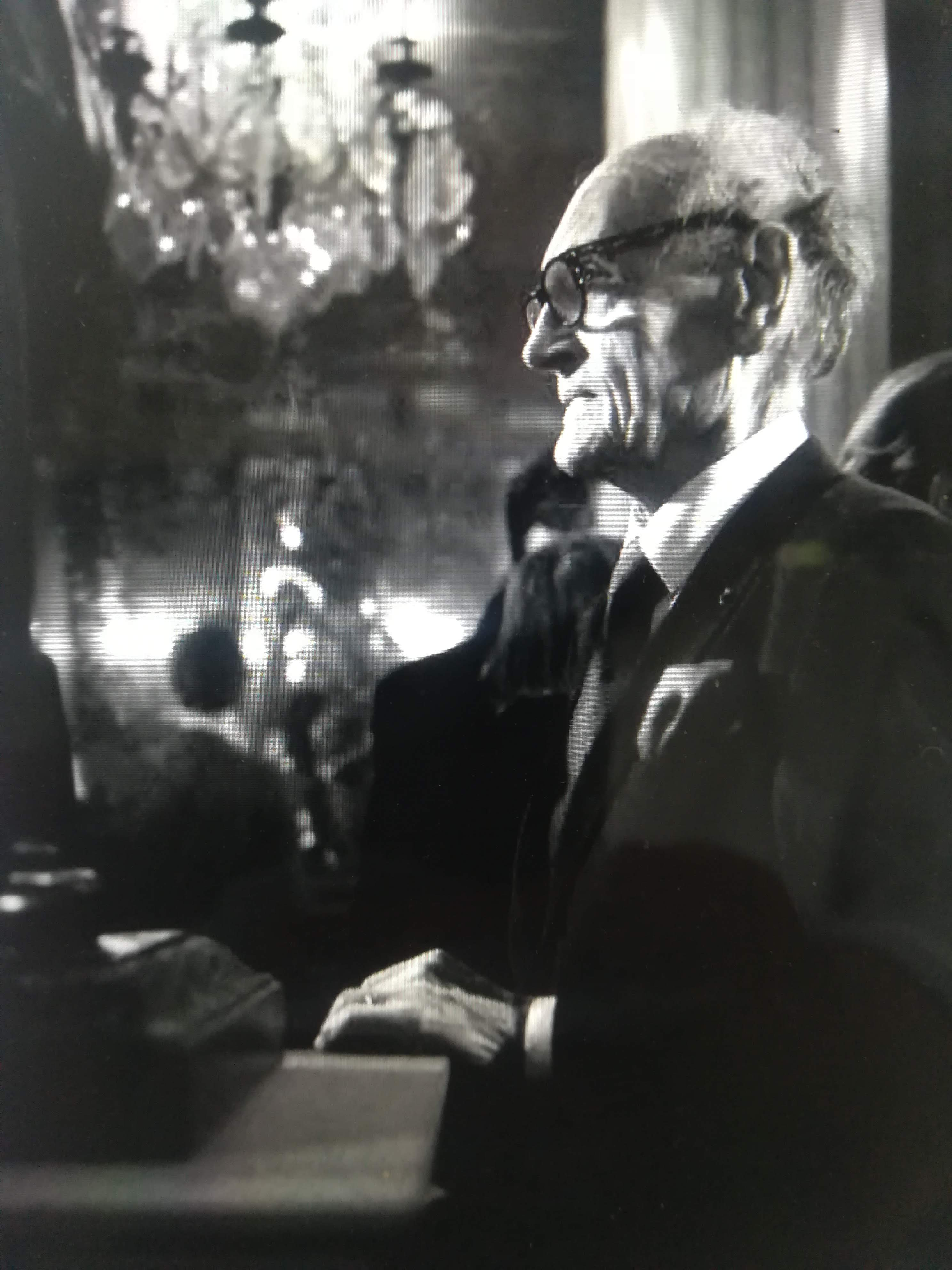 Alain-Erlande Brandenburg par Guy Ladrière, le 18 janvier 2017.